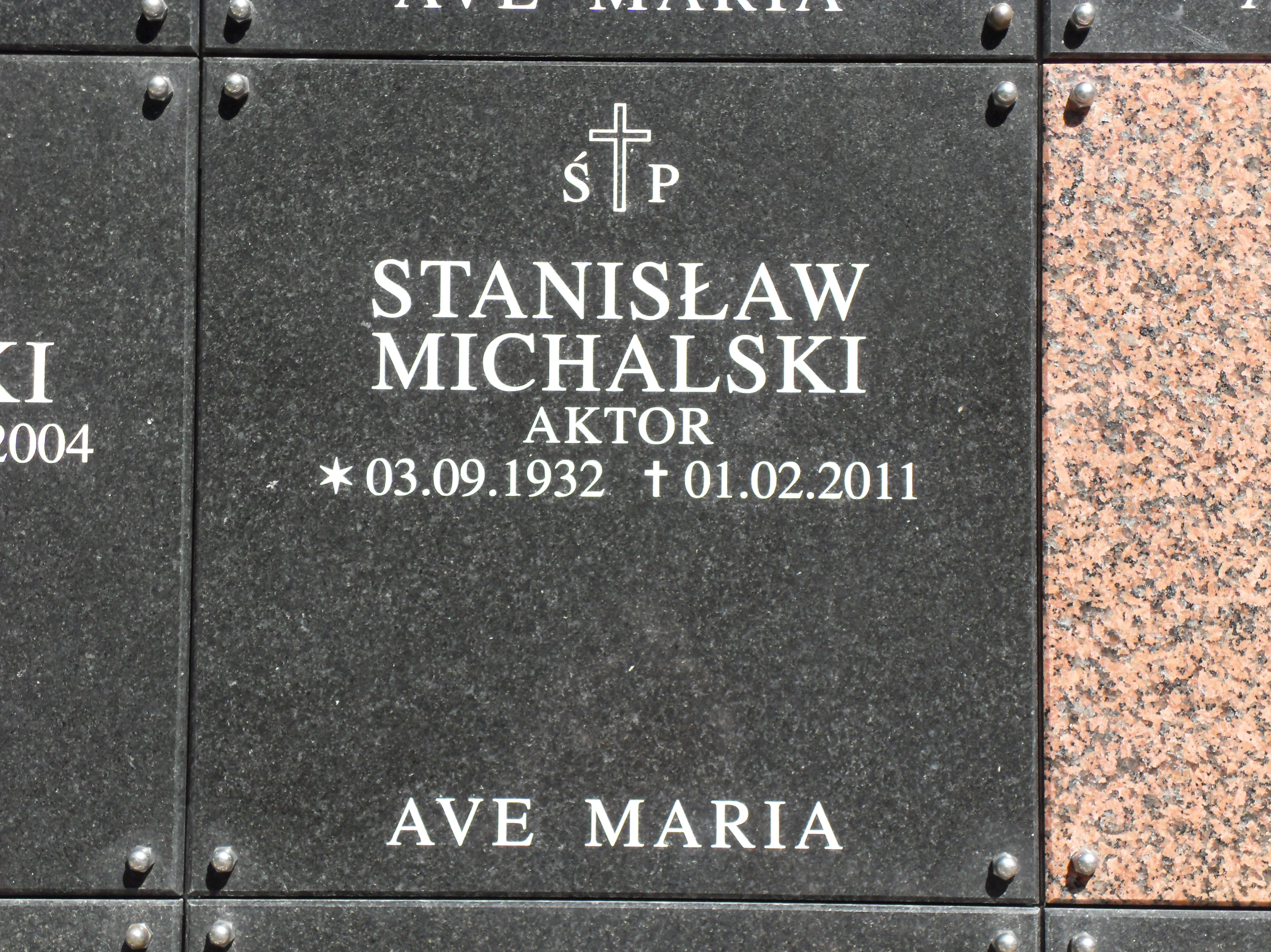 Gdańsk, cmentarz Srebrzysko. Grób aktora, Stanisława Michalskiego.